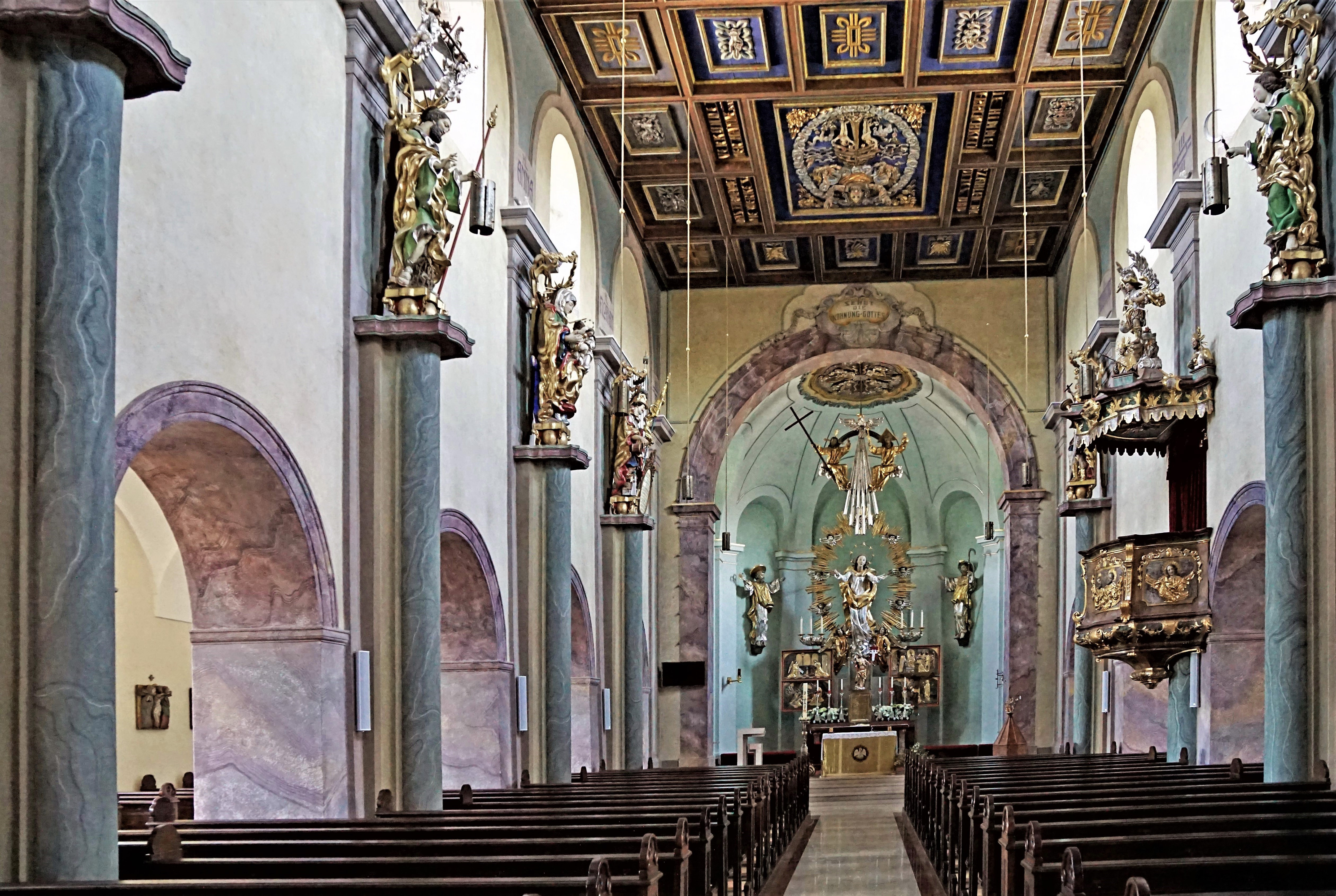 Kath. Pfarrkirche Hl. Jakobus d. Ä. (BDA-ID: 7975), Salesianergasse, Obertrum am See, Innenansicht